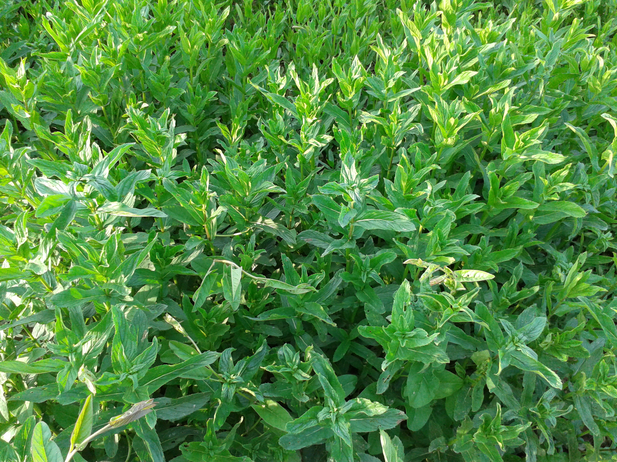 نعناع تنگ طه